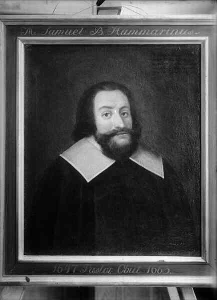 Porträtt föreställande S. Hammarinus, 1665. Kategori: (09) PorträttPorträtt föreställande S. Hammarinus, 1665.